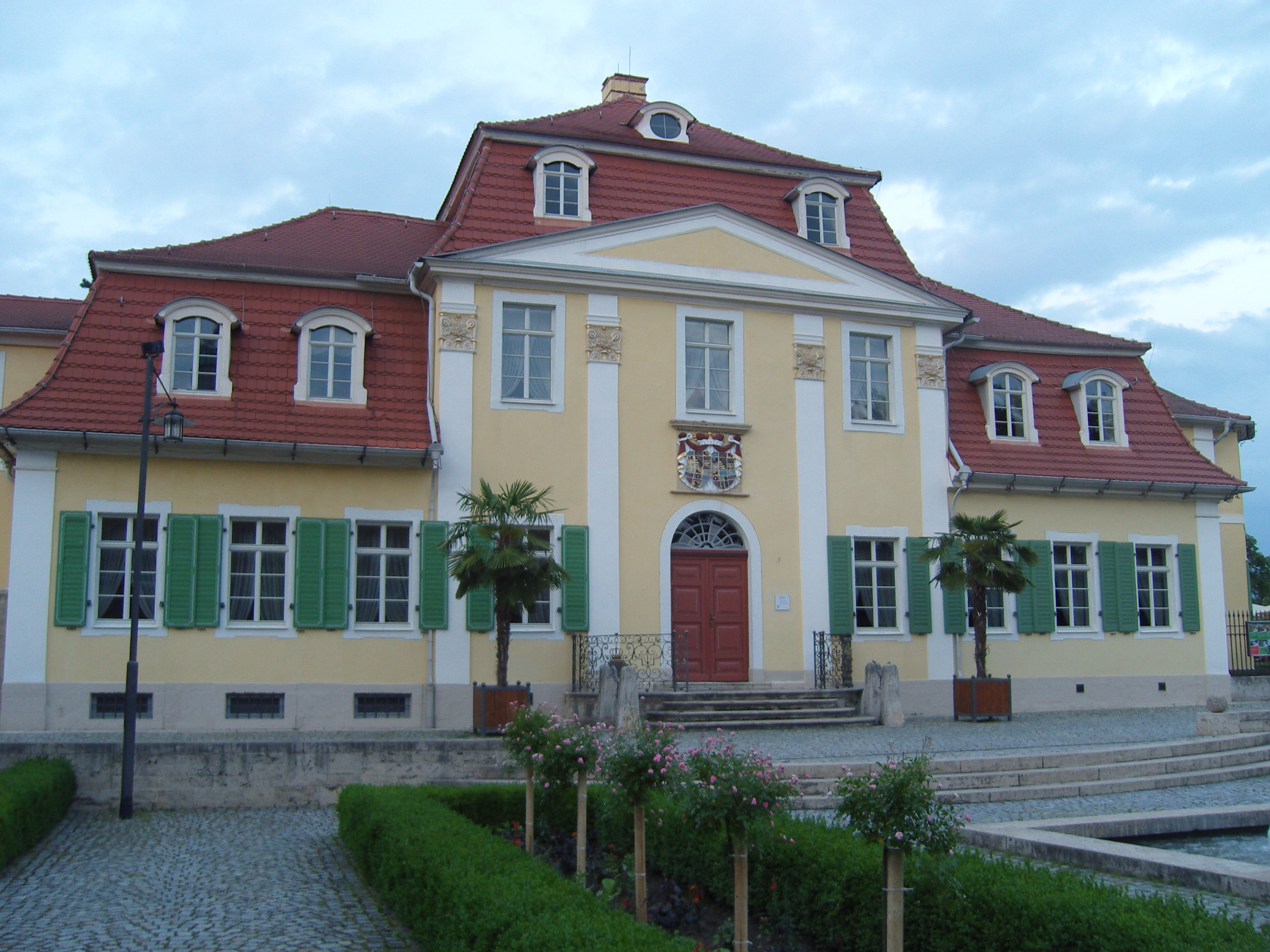 Friederikenschlößchen in Bad Langensalza